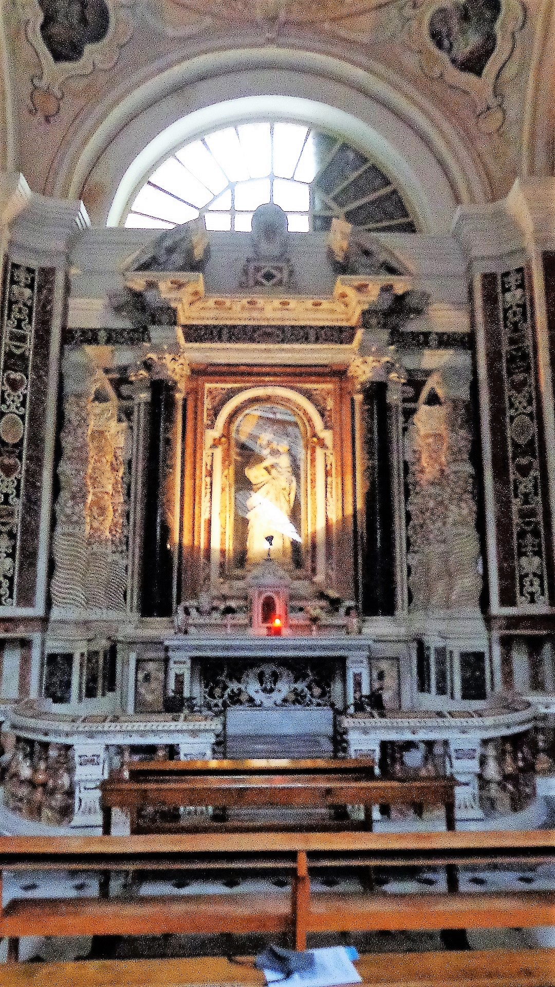 Interno chiesa